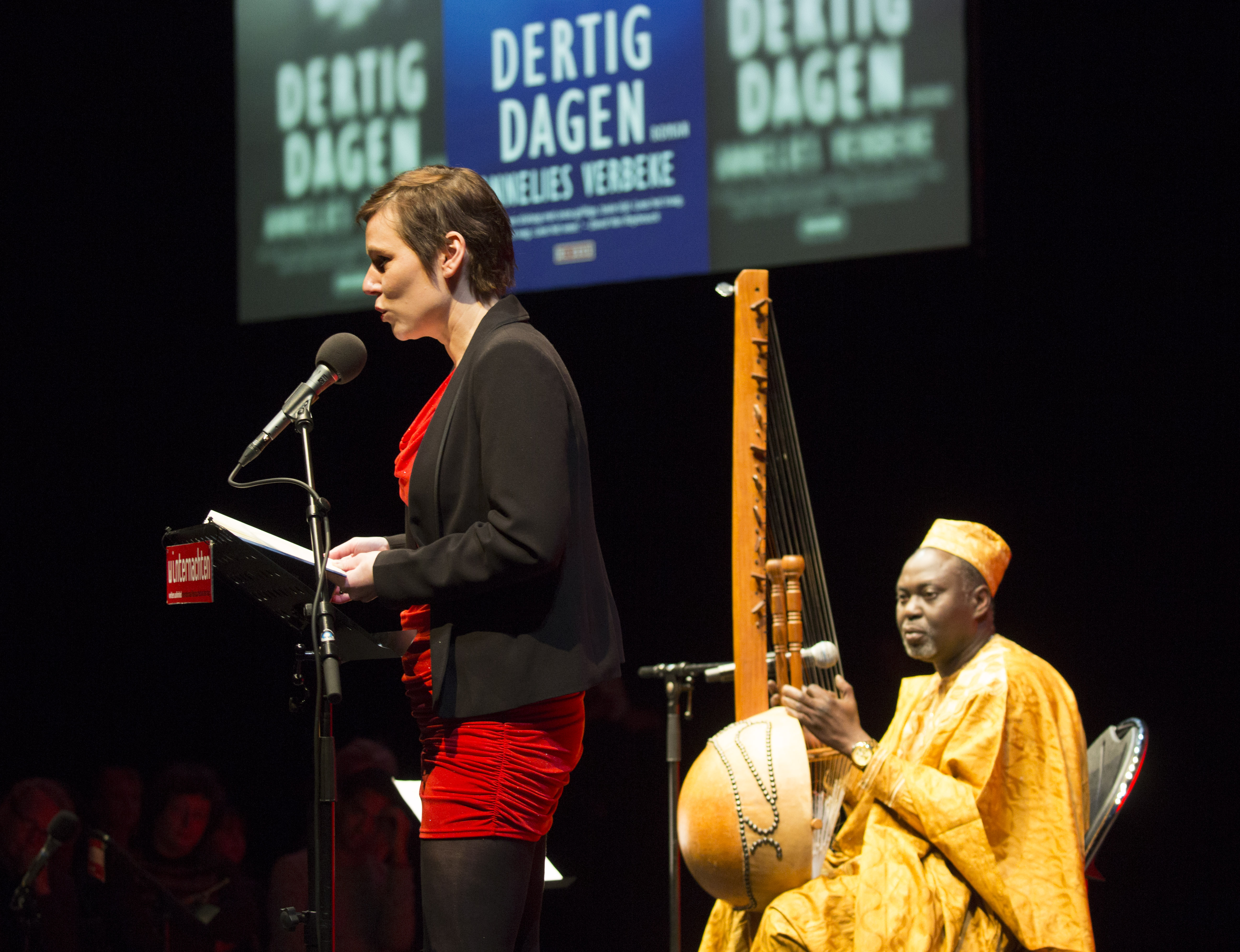 Annelies Verbeke & Lamin Kuyateh - Schrijversfeest - Winternachten 2016 Schrijversfeest Theater aan het Spui, Den Haag, Nederland